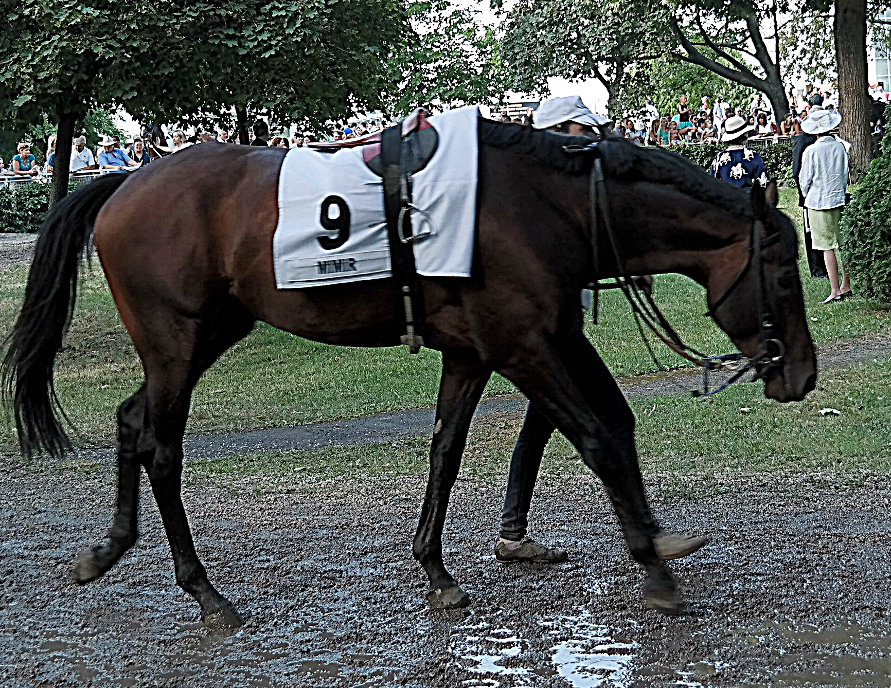 Magyar Derby 2013. Mimir A legjobb kanca. Kincsem Park.